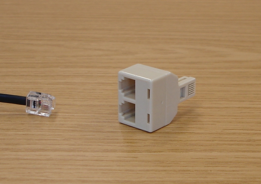 Telefonadapter RJ11 (Deutschland, USA, Spanien, Portugal, Griechenland) → hier nur Verteiler